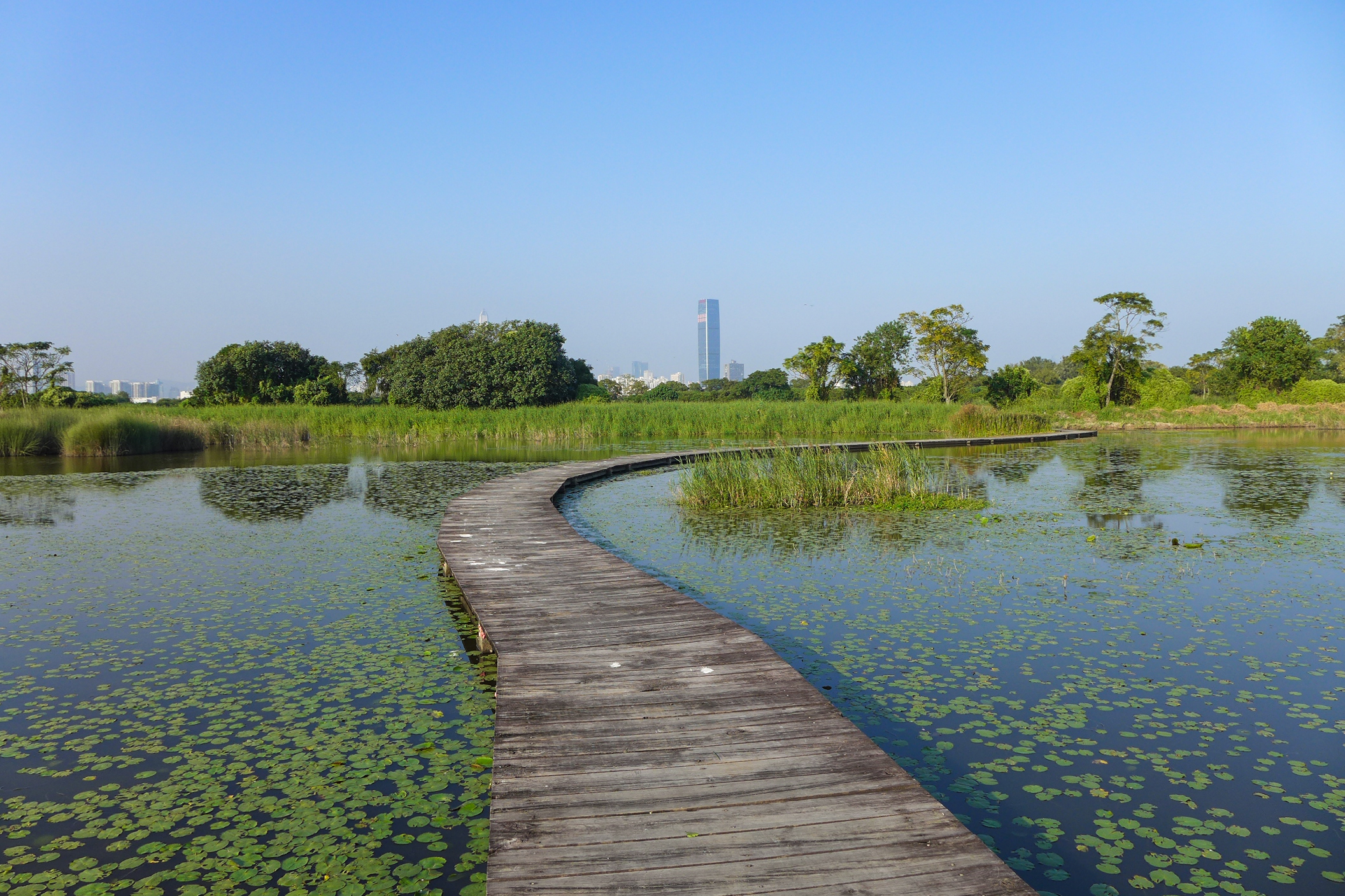 Mai Po Marshes Gei wai boardwalk